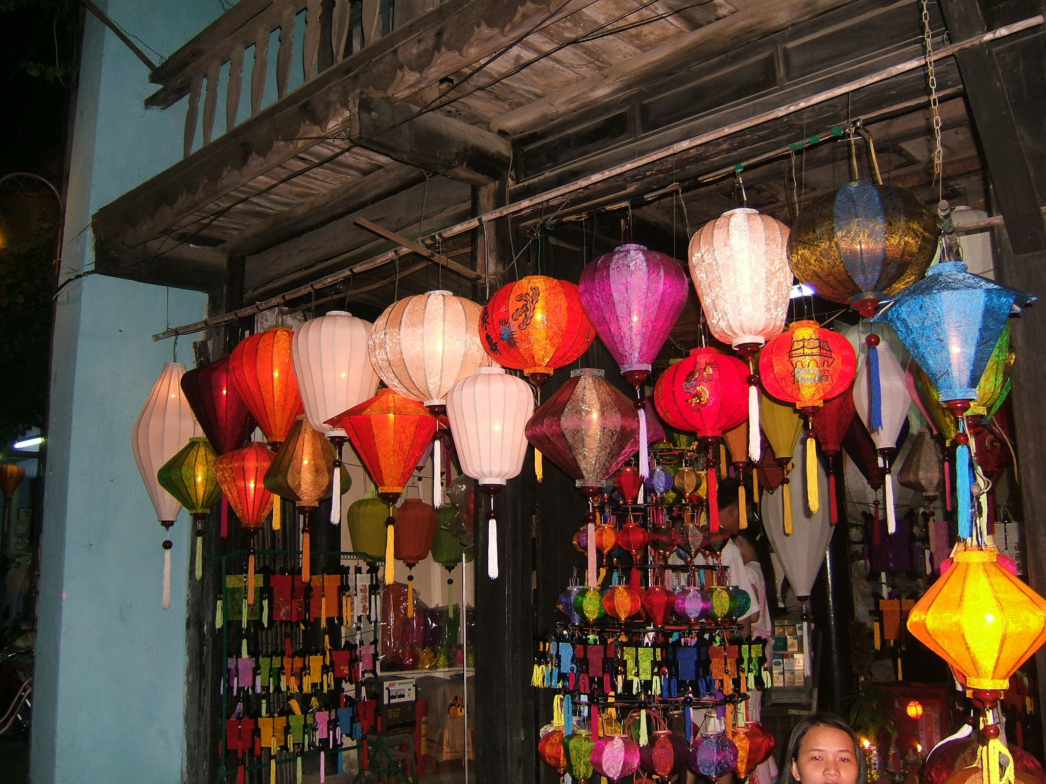 Ảnh chụp Đèn lồng Hội An